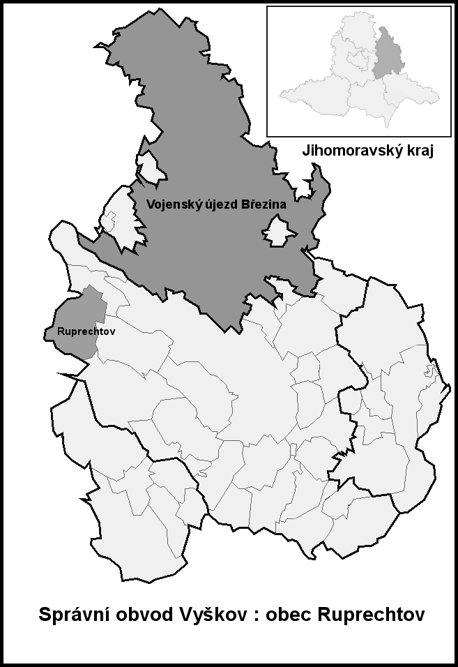 Hranice Ruprechtov (Vyškov- czech republic)